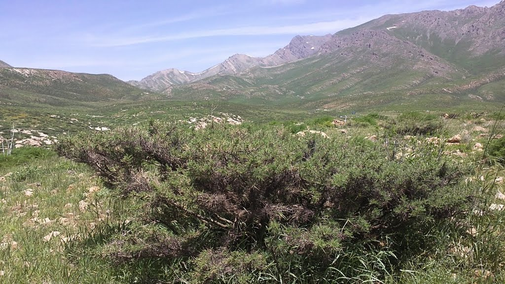 نمونه ای از درخچه گون